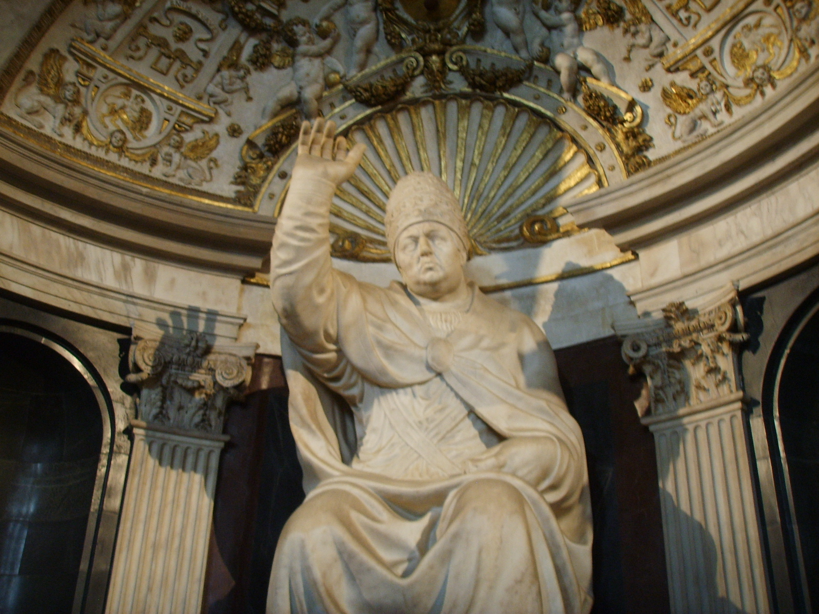 Palazzo vecchio, baccio bandinelli e vincenzo de' rossi, leone X